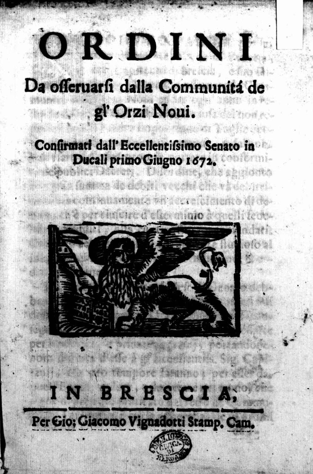 Frontespizio